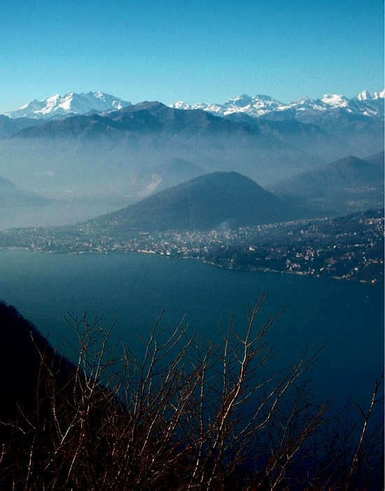 Uitzicht op Lago Maggiore vanaf uitzichtsbalkon naby Rifugio Adamoli